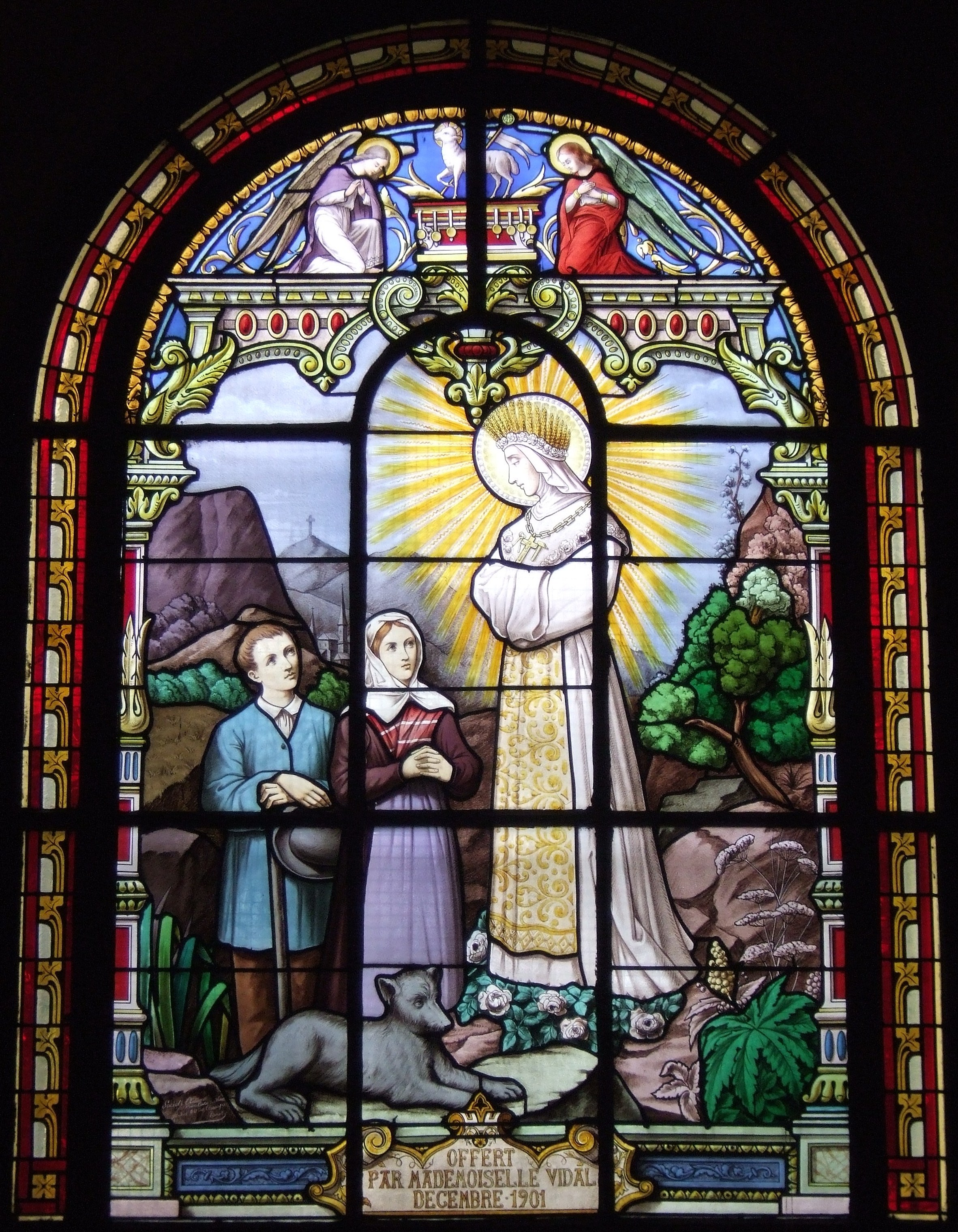 Bois-Colombes (Hauts de Seine, France) - Vitrail de l'église représentant l'apparition de la Vierge à La Salette